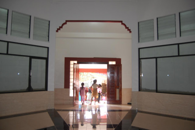 Interior